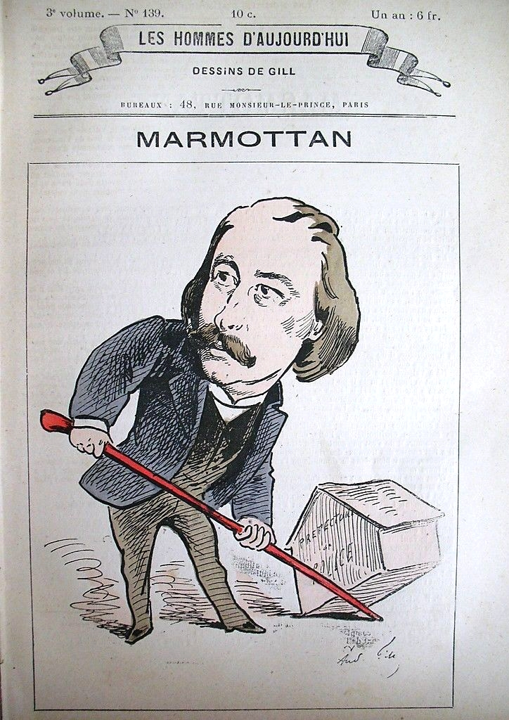 Pierre Marmottan (1832-1814), caricature par André Gill, Les Hommes d'aujourd'hui, n°138, 1880.